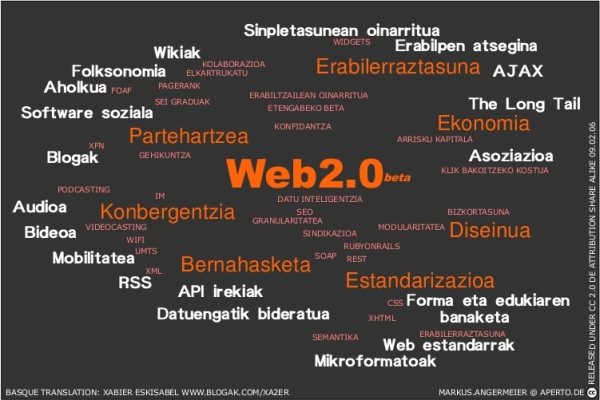 Web 2.0 filosofiaren kontzeptuak.